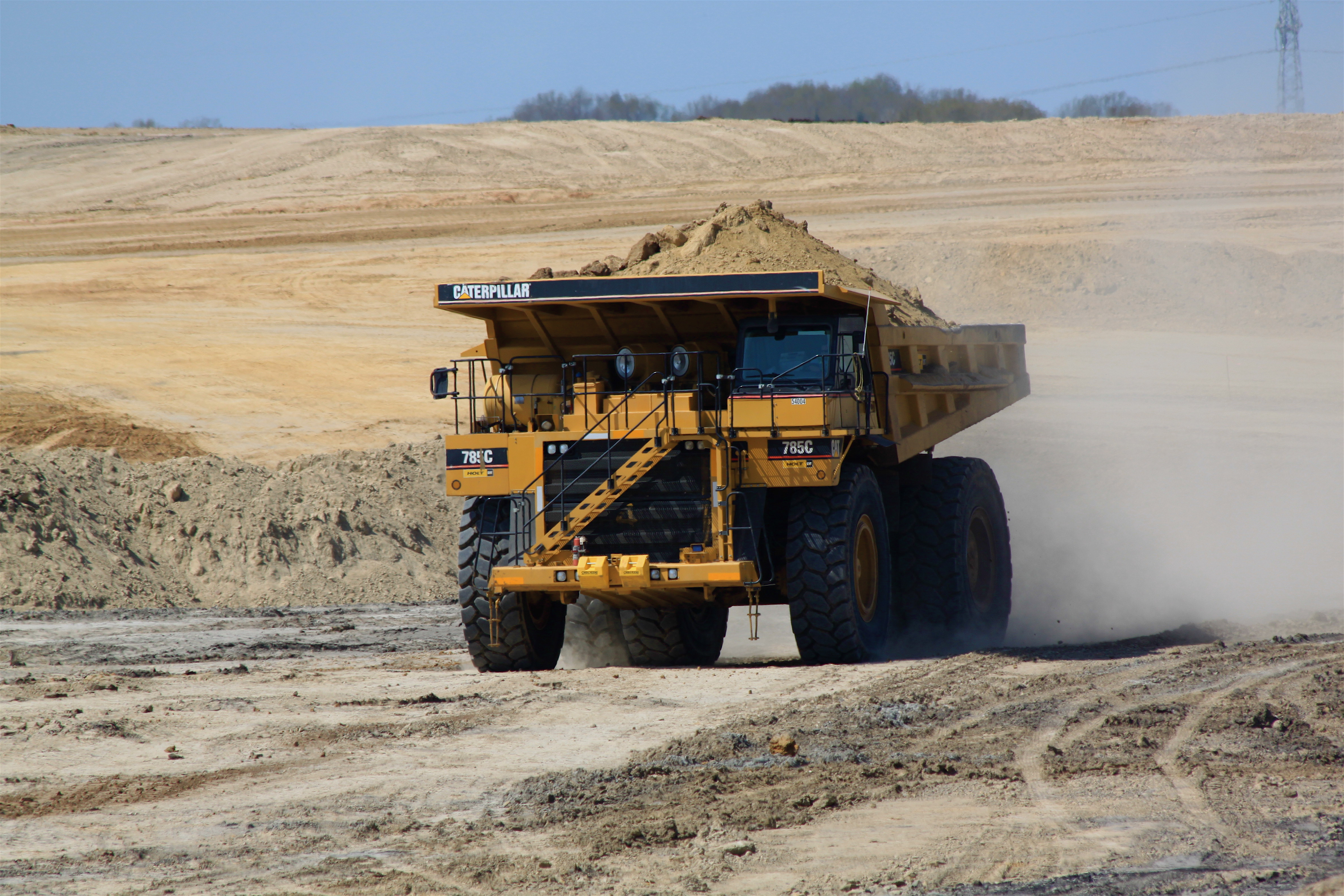 Hauling overburden. Kosse Mine supplies Oak Grove power plant.